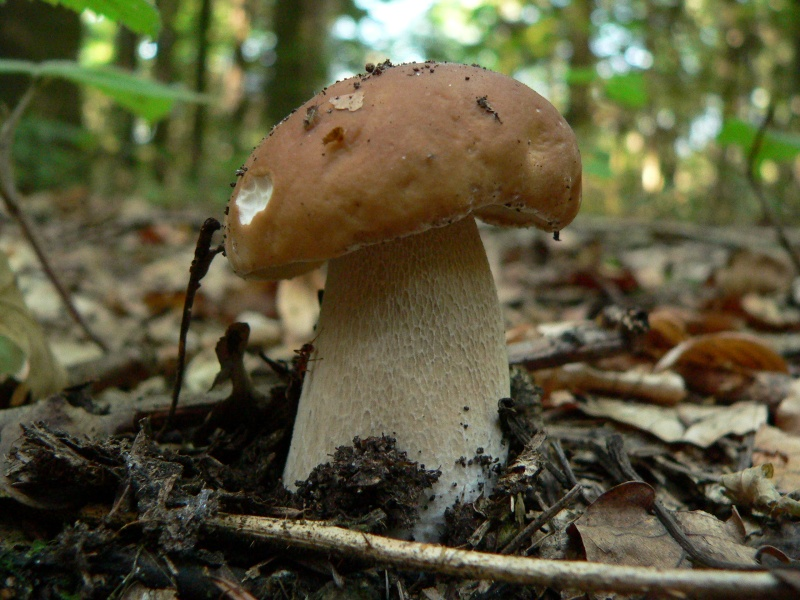 Borowik szlachetny (Boletus edulis). Zdjęcie wykonane w sierpniu 2005 (Stara Góra, gmina Stąporków, województwo świętokrzyskie)